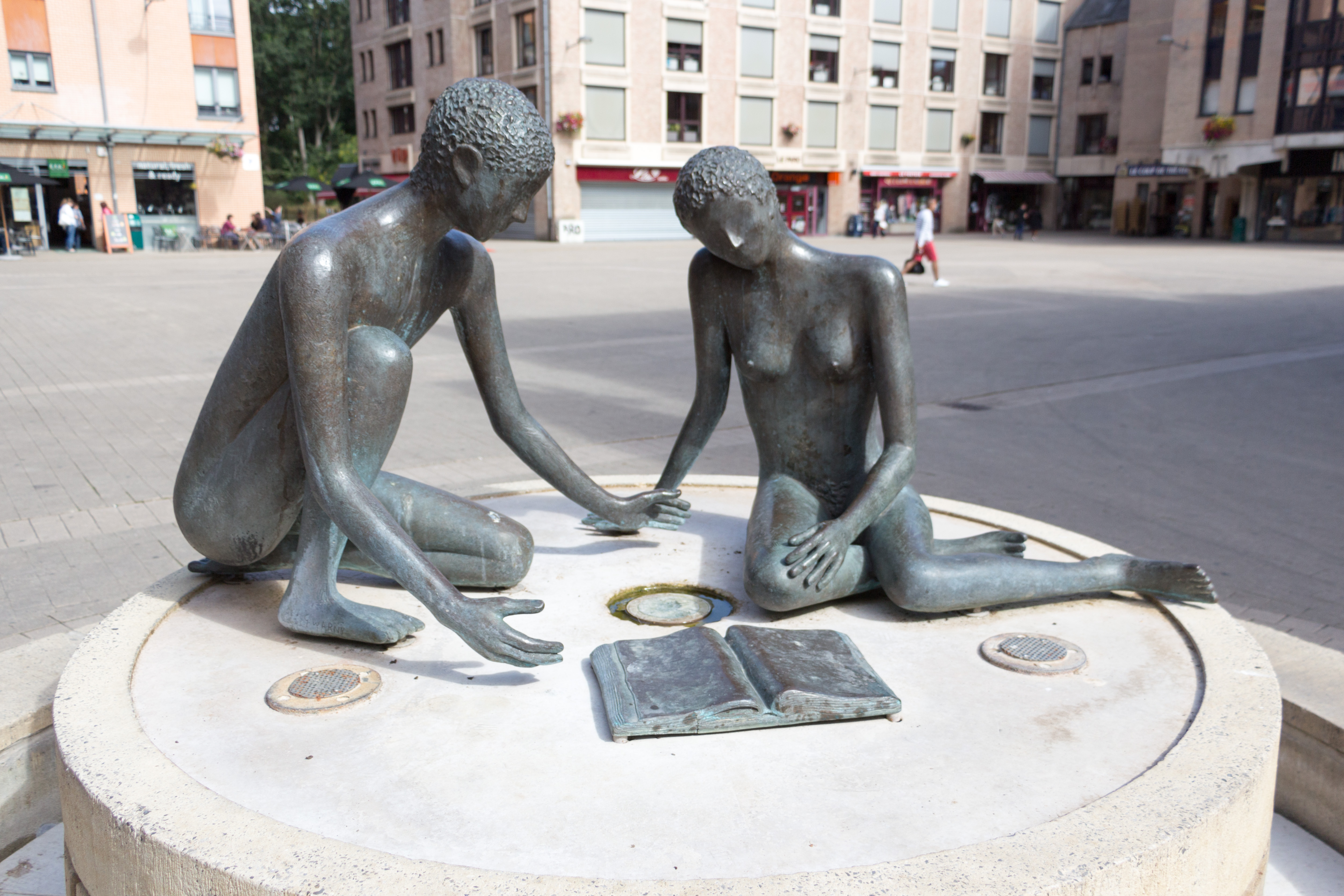 Léon et Valérie, sculpture de Geneviève "Gigi" Warny.